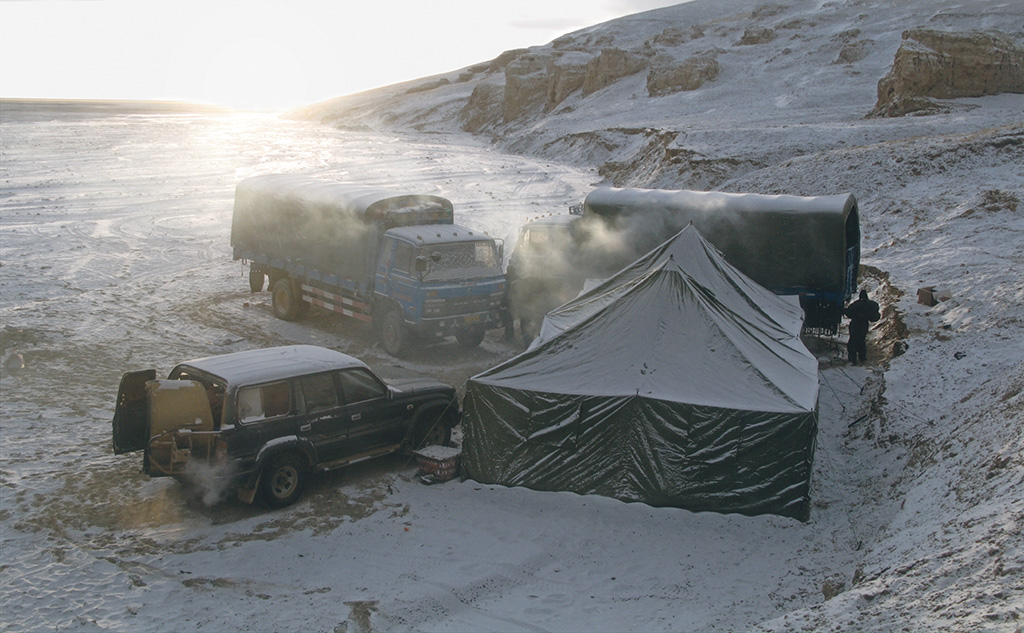 산소가 부족한 상태에서 온도계는 영하30℃를 가리킨다